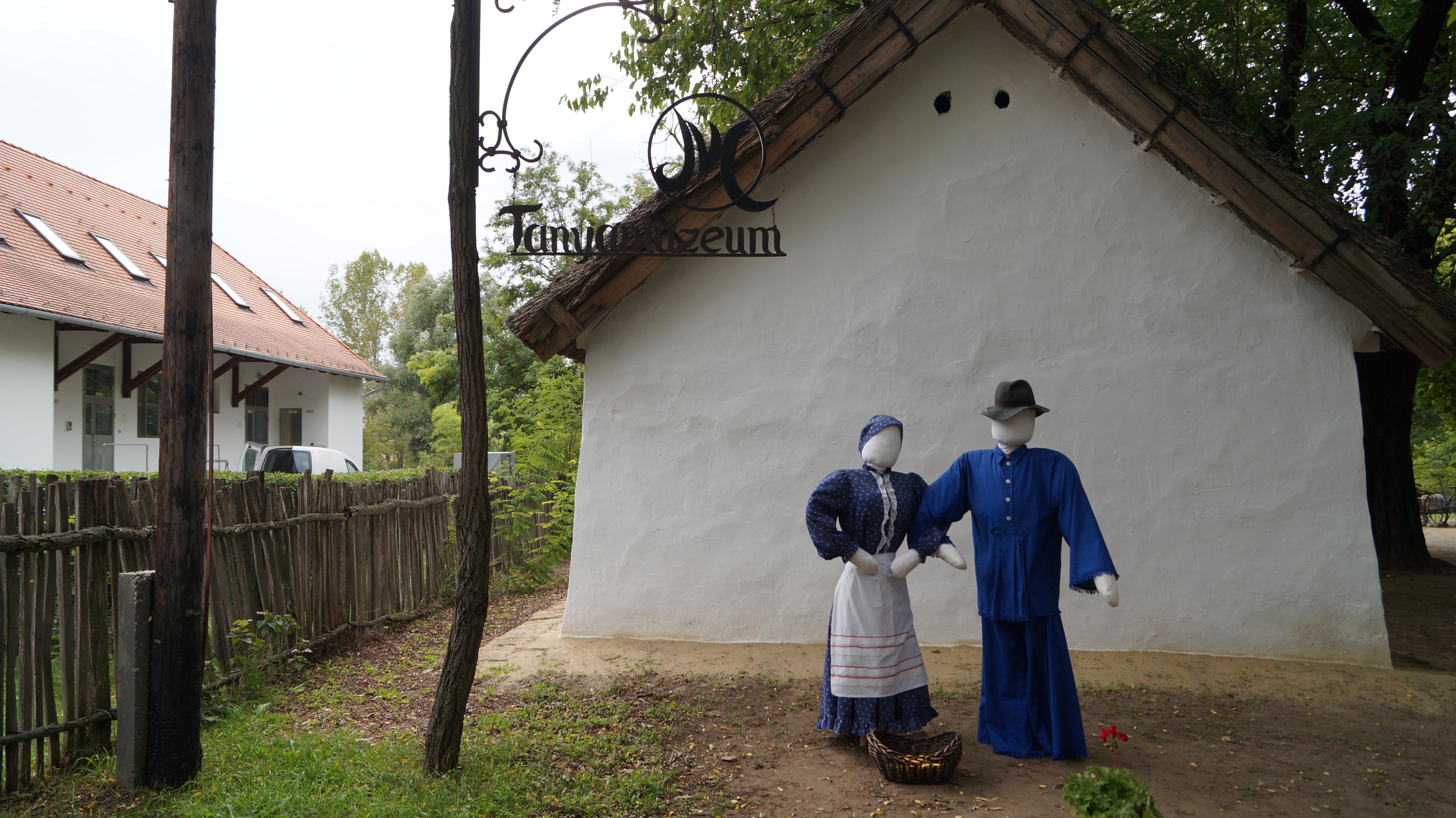 Tanyamúzeum – istálló This is a photo of a monument in Hungary. Identifier: 17078